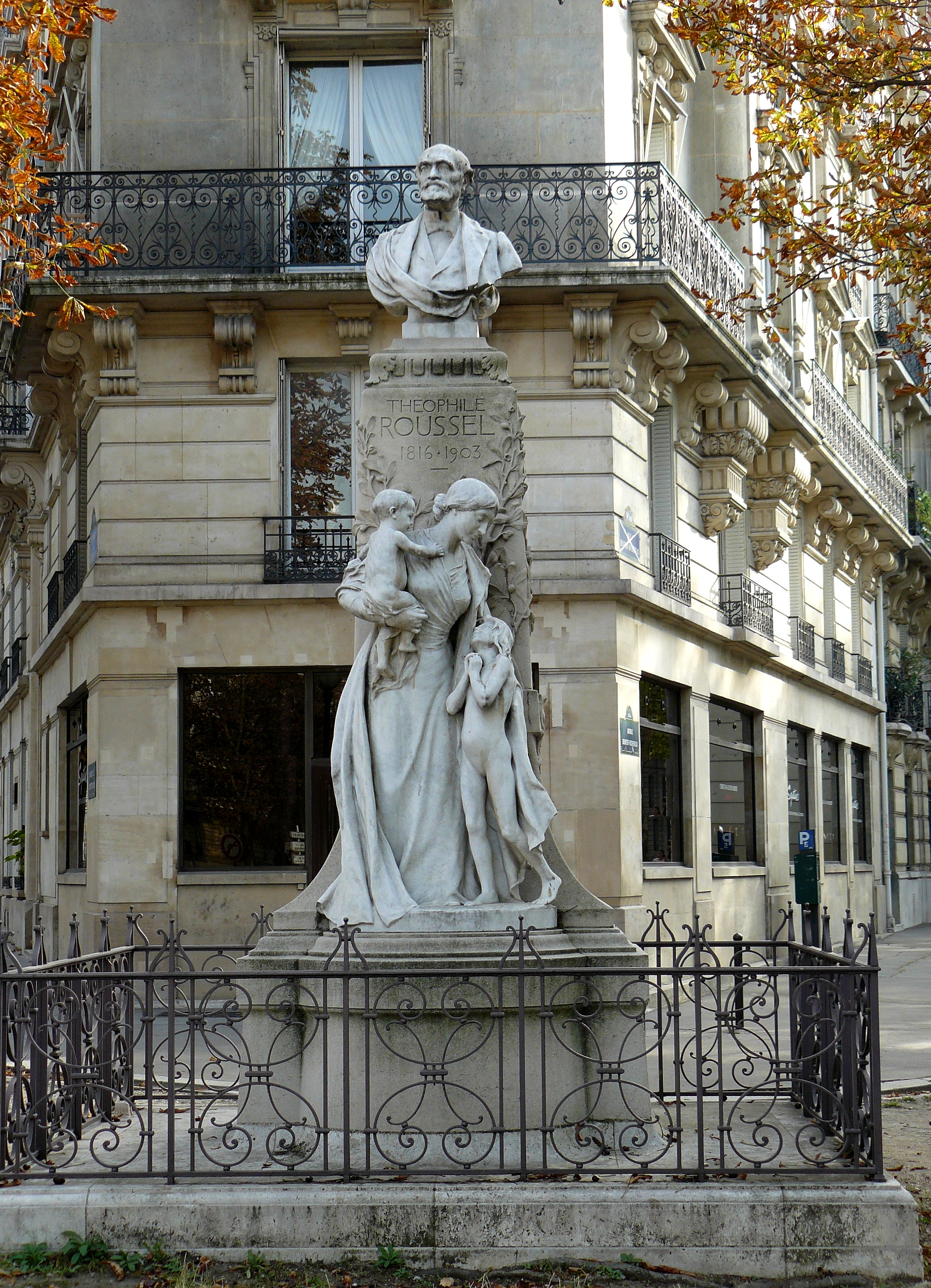 Monument à la gloire de Théophile Roussel près de l'Observatoire de Paris dans le 14e arrondissement. Sculpteur Jean-Baptiste Champeil 1906